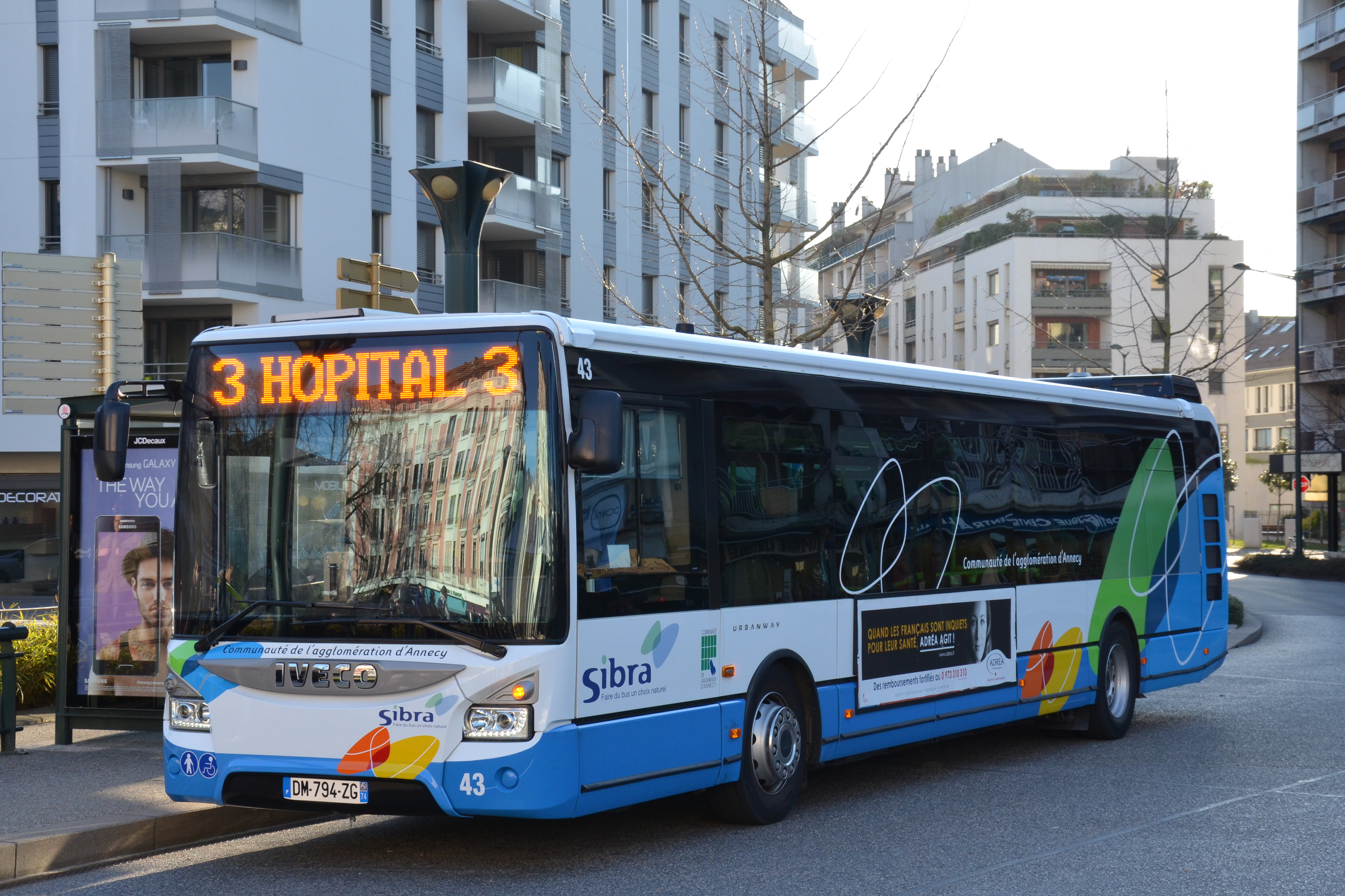 Iveco Bus Urbanway n°43 sur la ligne 3 du réseau SIBRA d'Annecy, à l'arrêt Gare Pôle d'échanges.